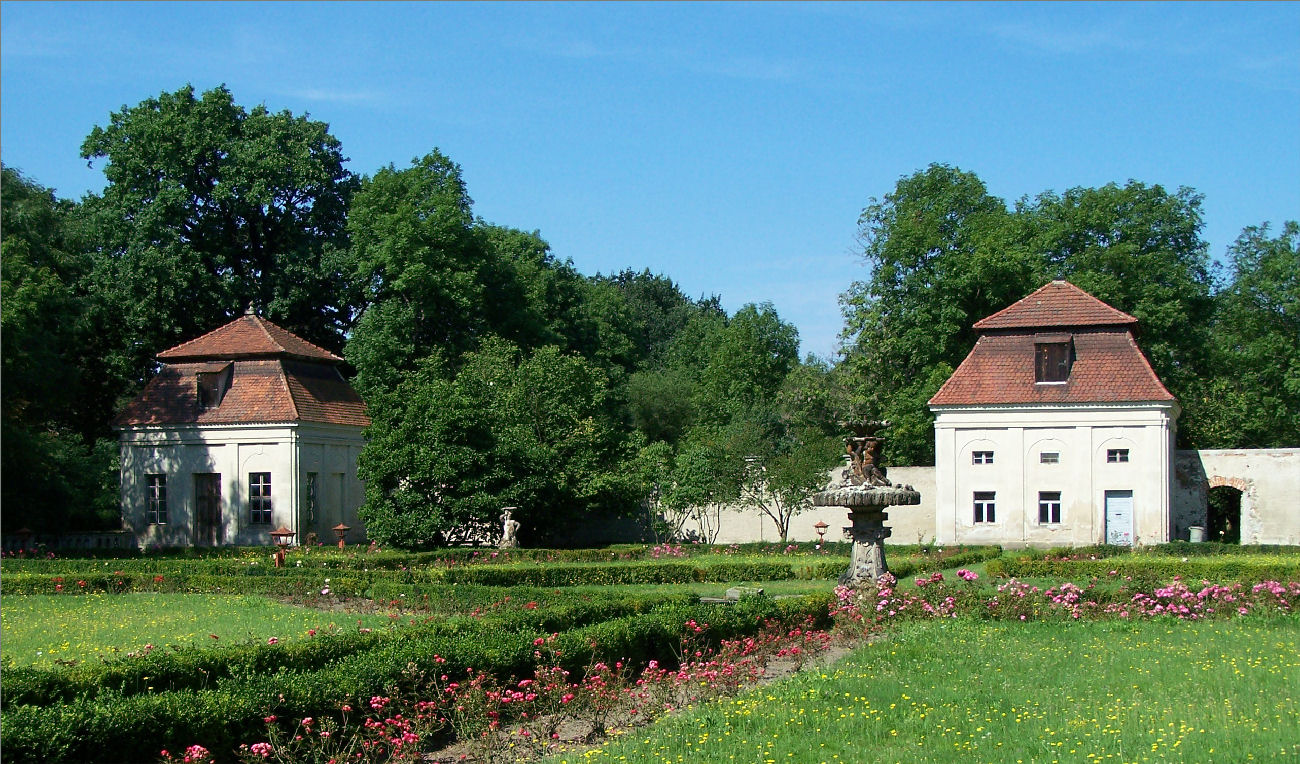 Tiefenau, noch erhaltene Parkanlage